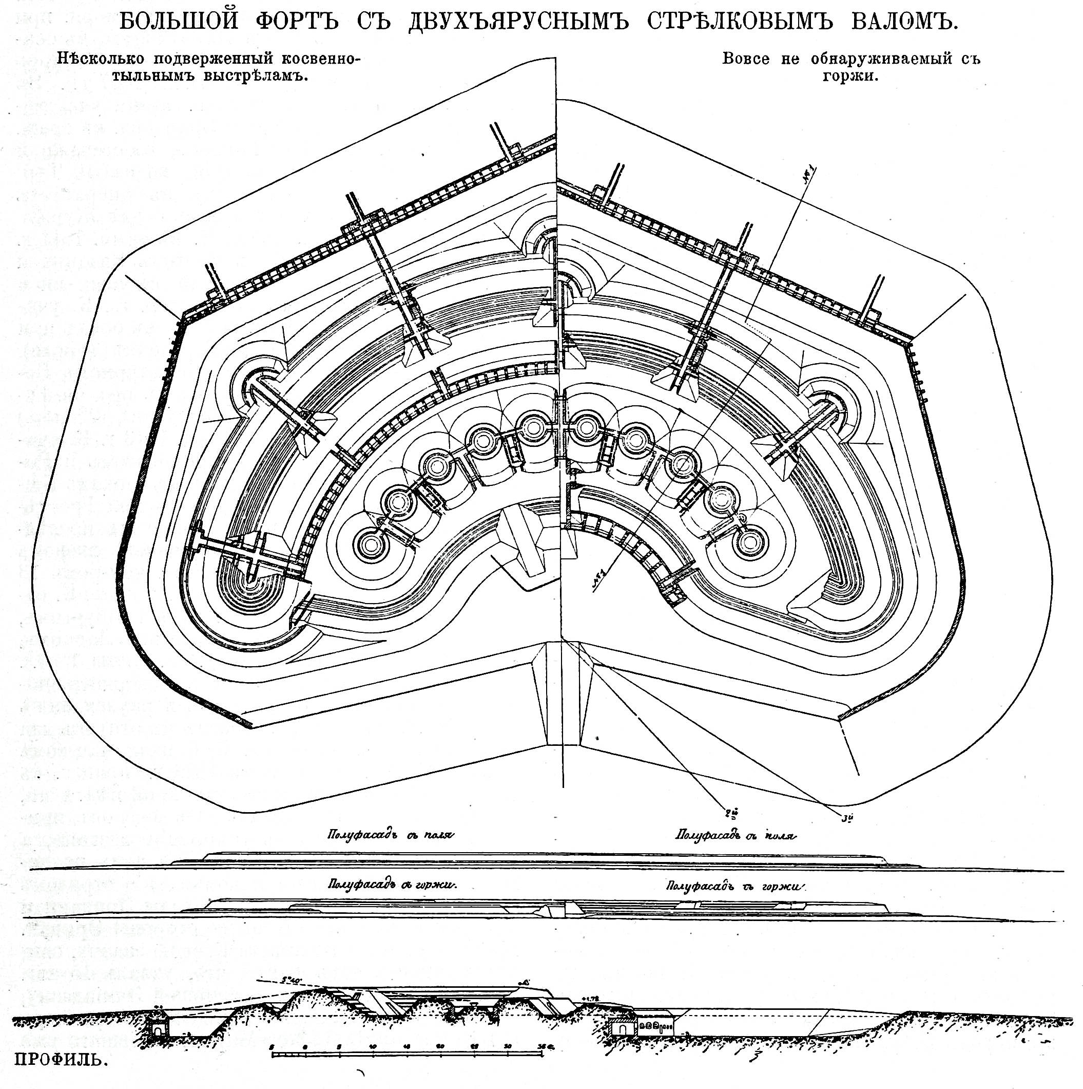 Эта фотография была использована для иллюстрирования статьи «Крассовский, Ростислав Владимирович» опубликованной в тринадцатом томе «Военной энциклопедии», который был издан книгоиздательским товариществом И. Д. Сытина в 1913 году в столице Российской империи городе Санкт-Петербурге. Более подробное описание к этой картинке можно прочесть в указанной выше статье.